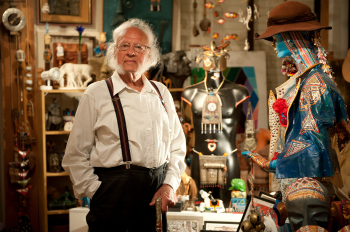 האמן משה נובק בסטודיו שלו בחיפה